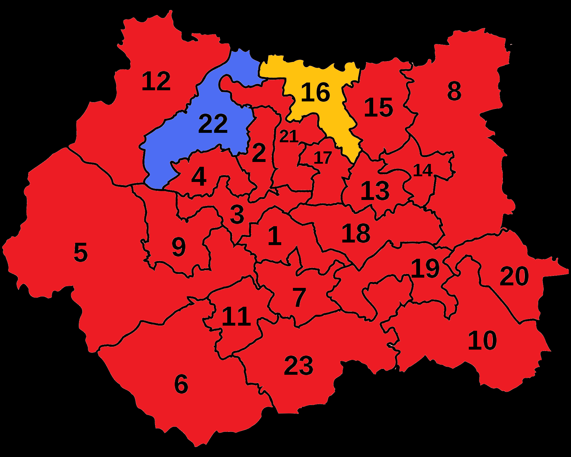 Seats won in 2005